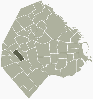 Barrio de Vélez Sársfield